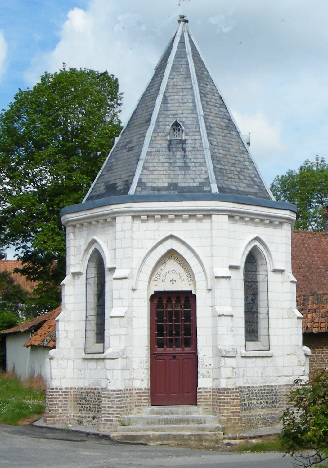 La chapelle du Bon-secours, Argoules, Somme, France.